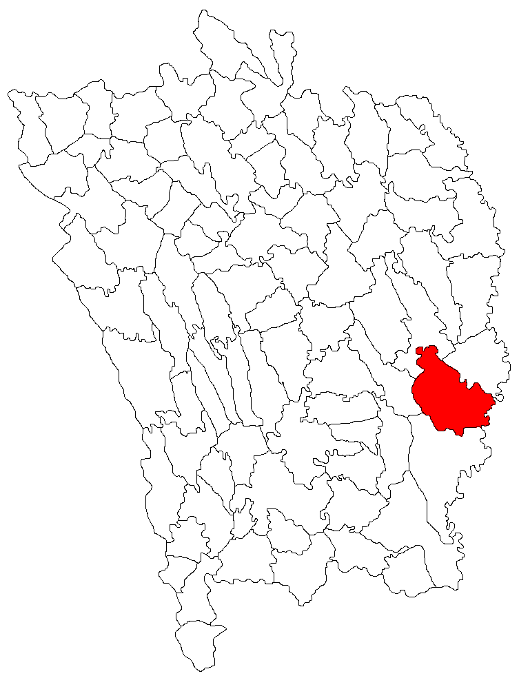 Categorie:Hărţi ale judeţului Vaslui